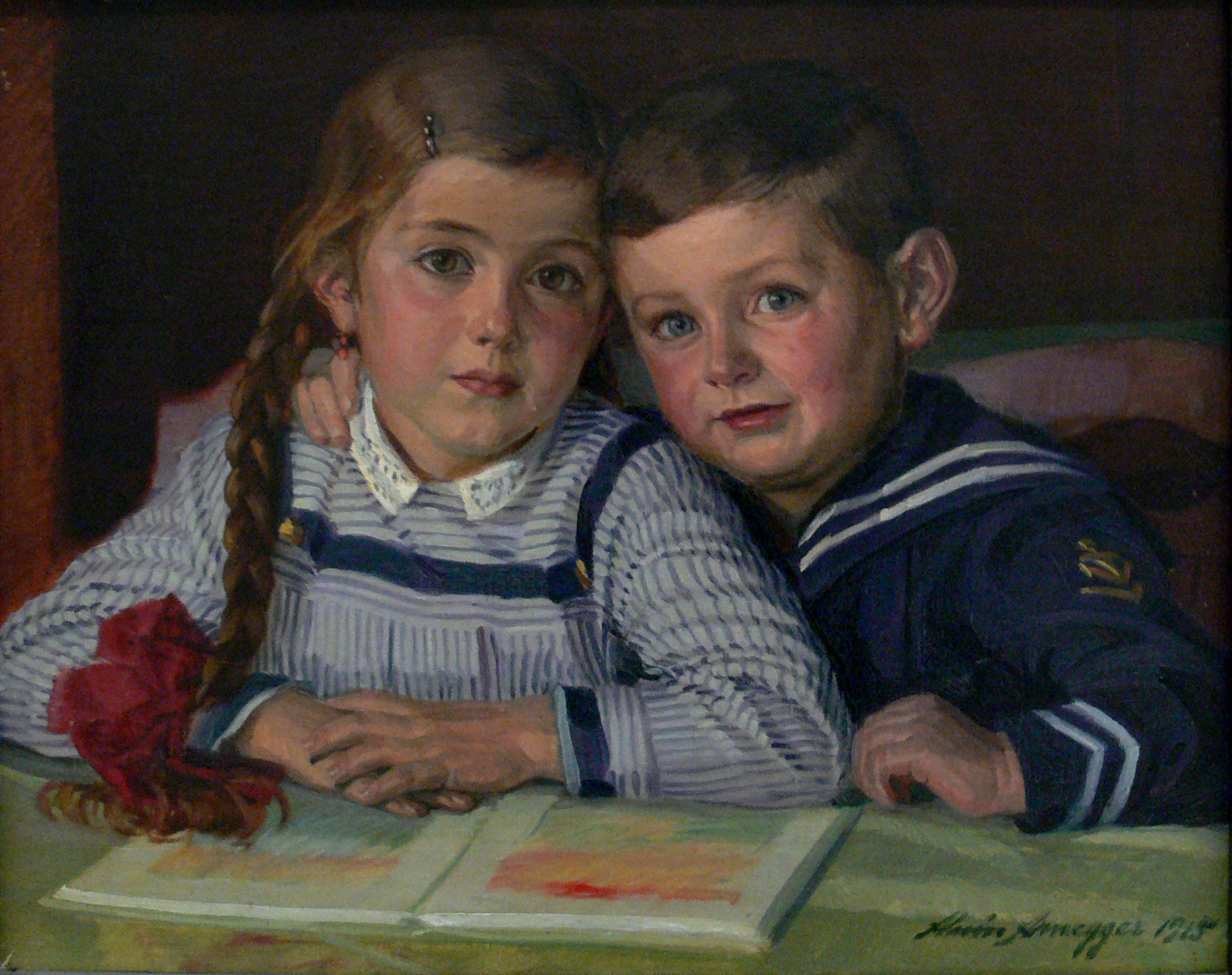 Portrait der Geschwister Fromknechtlabel QS:Lde,"Portrait der Geschwister Fromknecht"